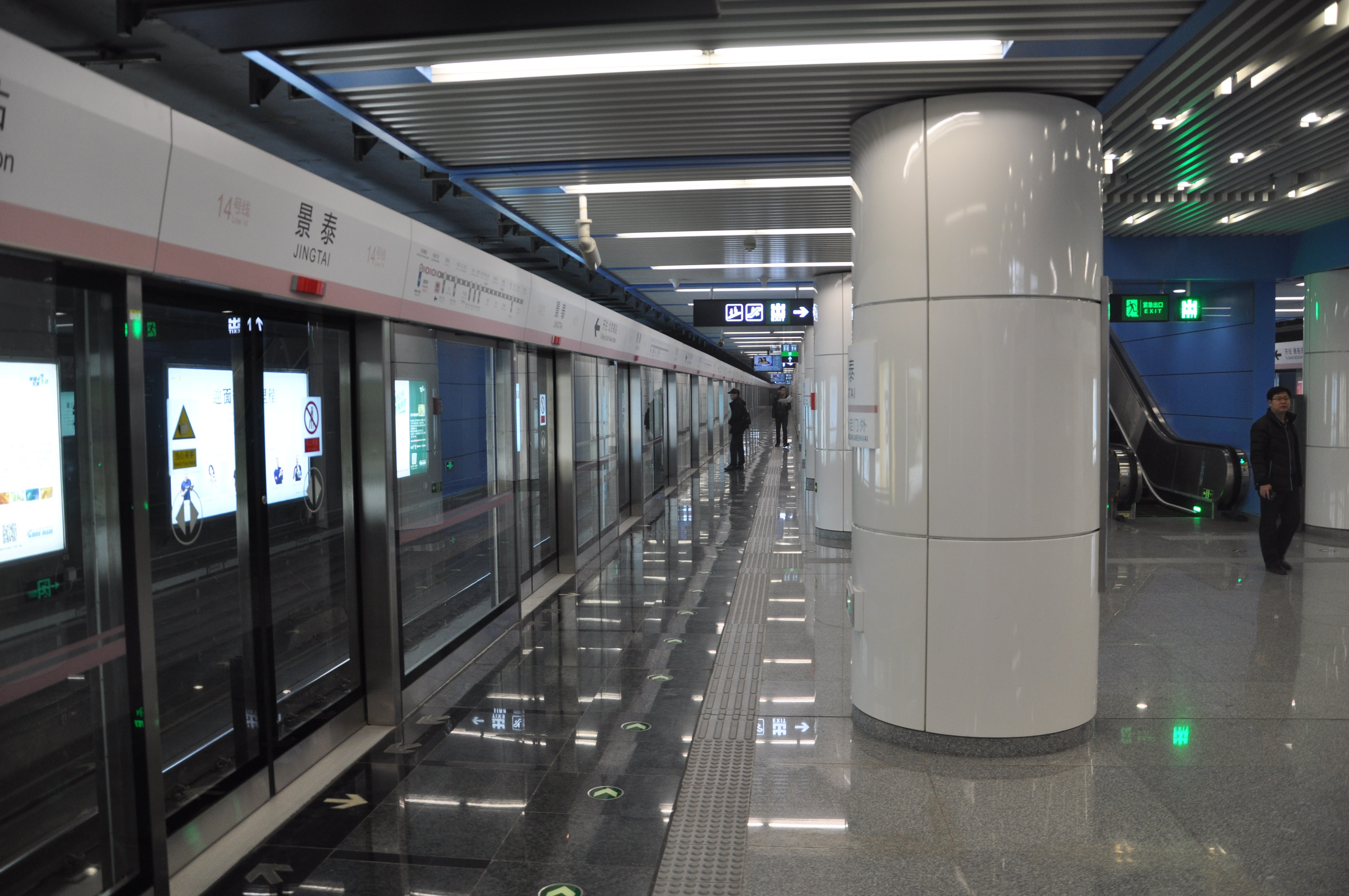 北京地铁14号线景泰站站台